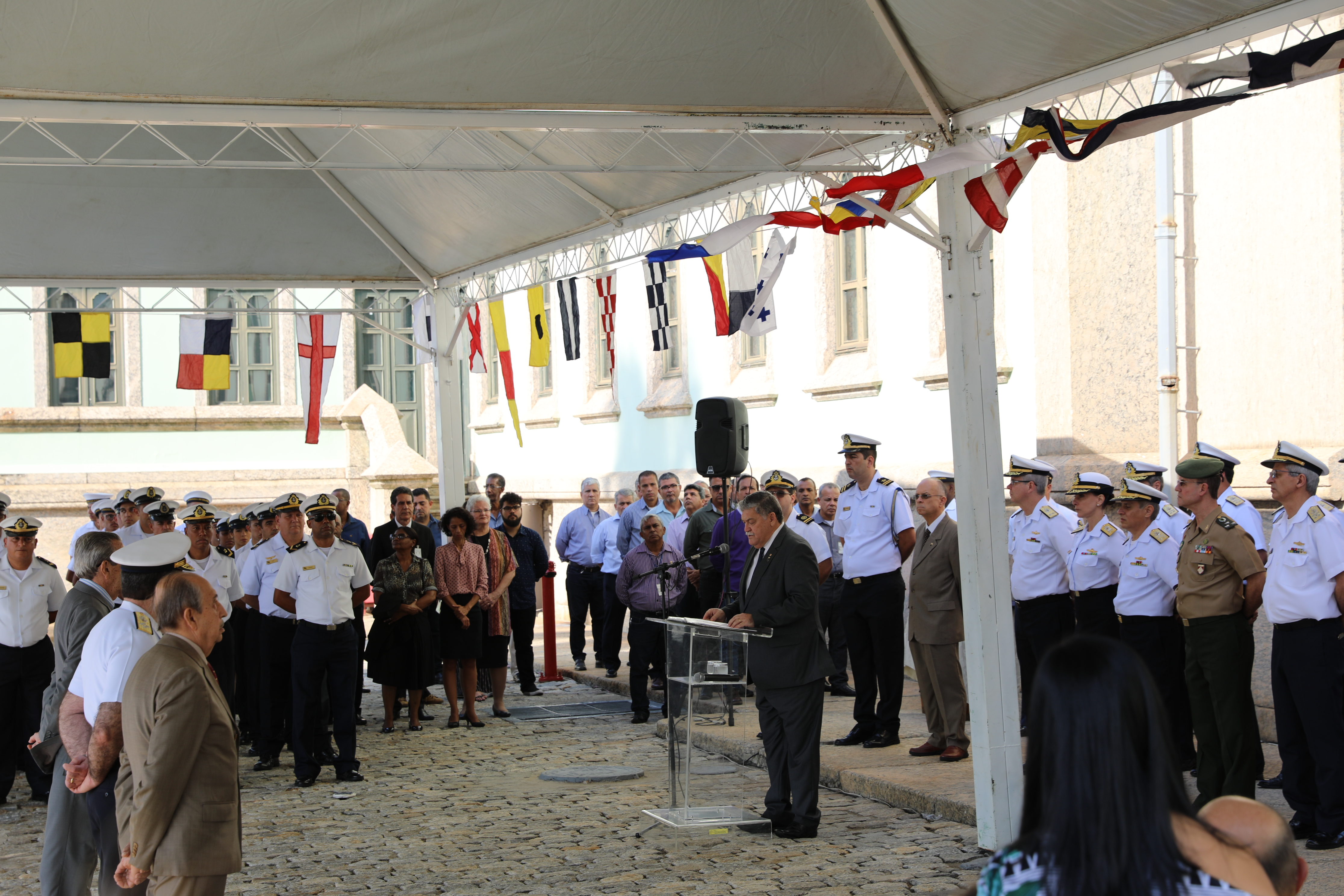 Cerimônia comemorativa dos 76 Anos da DPHDM e lançamento da 8. Edição do livro Arte Naval publicado pela editora do Serviço de Documentação da Marinha